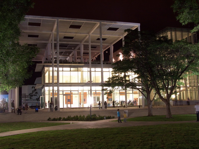 Imagen nocturna de la Biblioteca Central Estatal Wigberto Jiménez en el Centro Cultural Guanajuato.